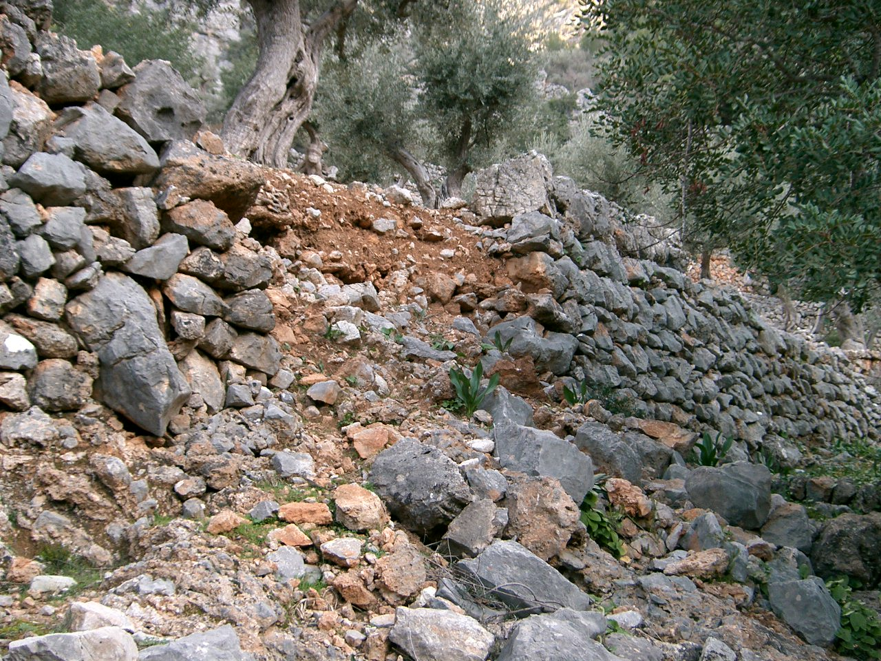 Marge esbaldregat a Ca's Deco, Fornalutx.